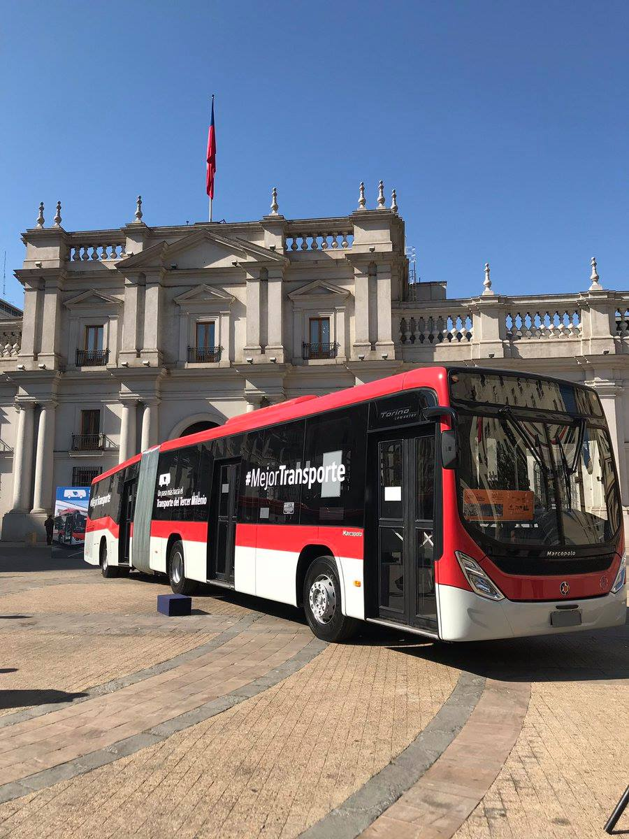 Presentación de los buses del plan "Transporte Tercer Milenio".